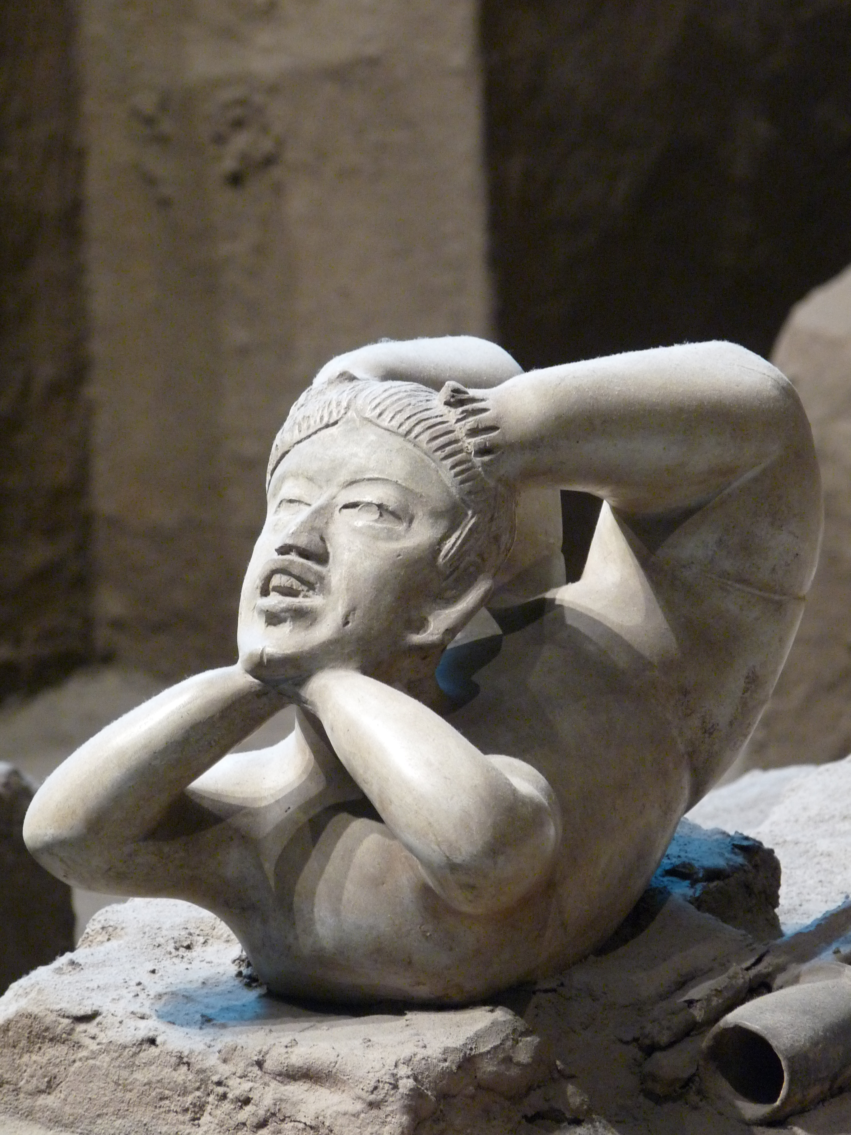 Reconstitución de una vasija de cerámica en forma de acróbata, en la posición en que ésta fue encontrada en el sitio arqueológico de Tlatilco del Estado de México, en el entierro 154 del templo IV (reconstitución expuesta en el Museo Nacional de Antropología de México).